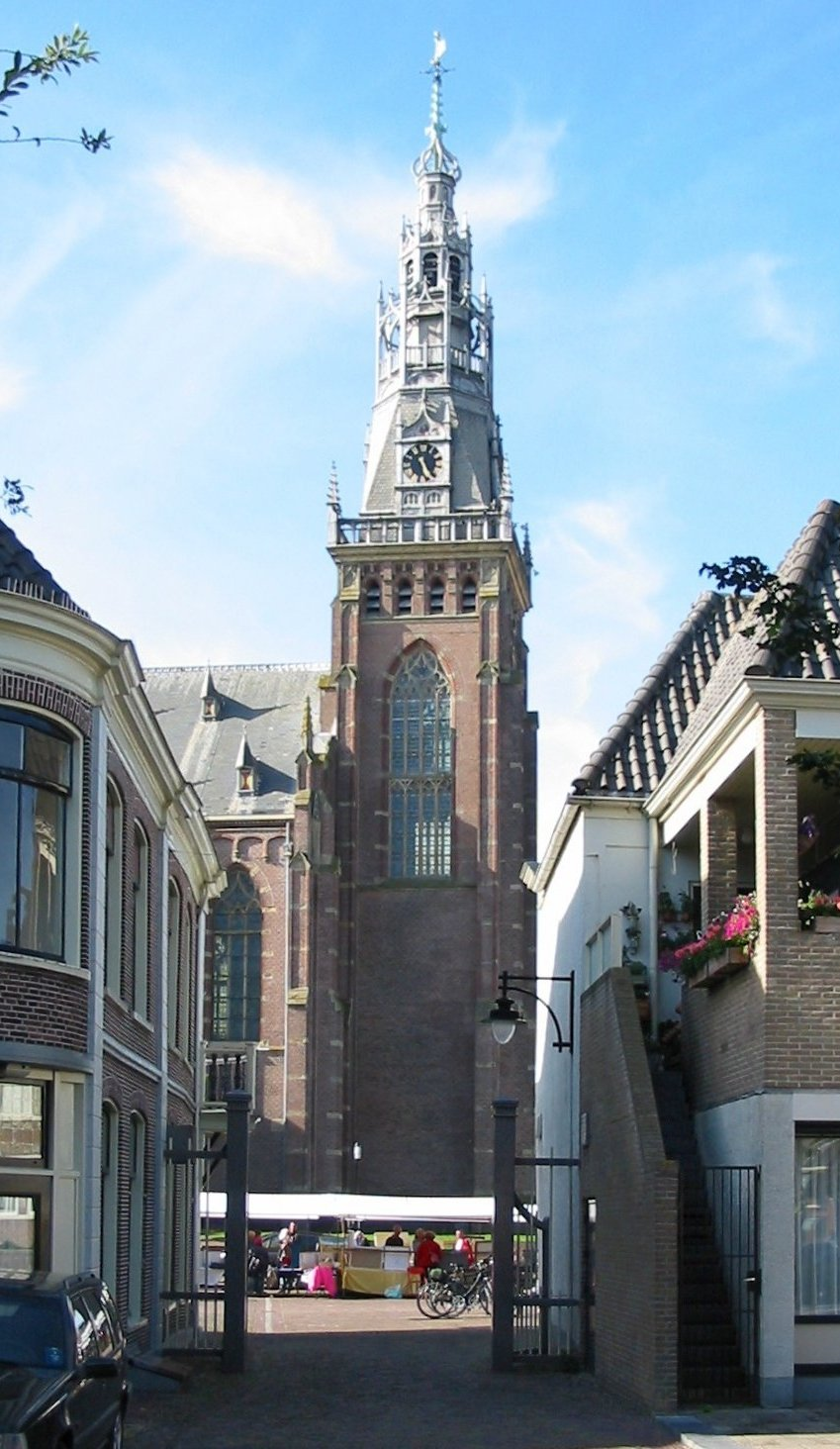 Kirche in Schagen